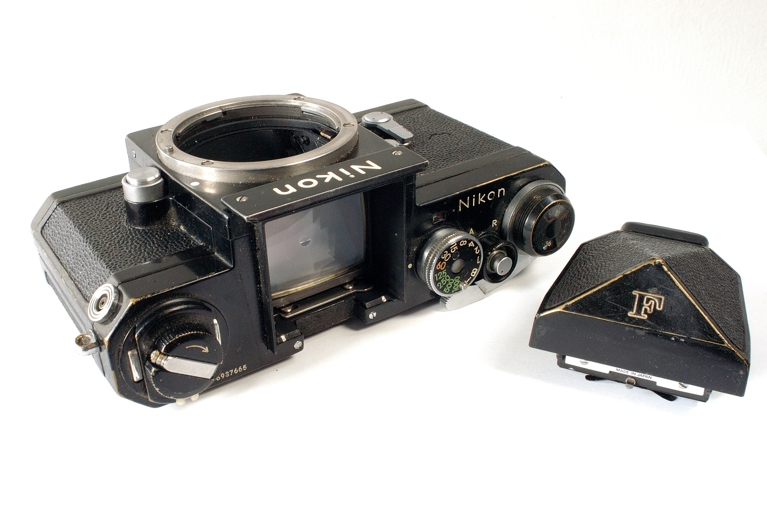 Nikon F